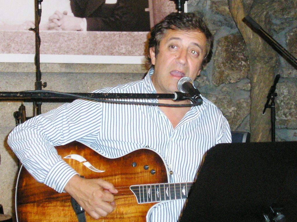 Portuguese singer Rui Veloso.